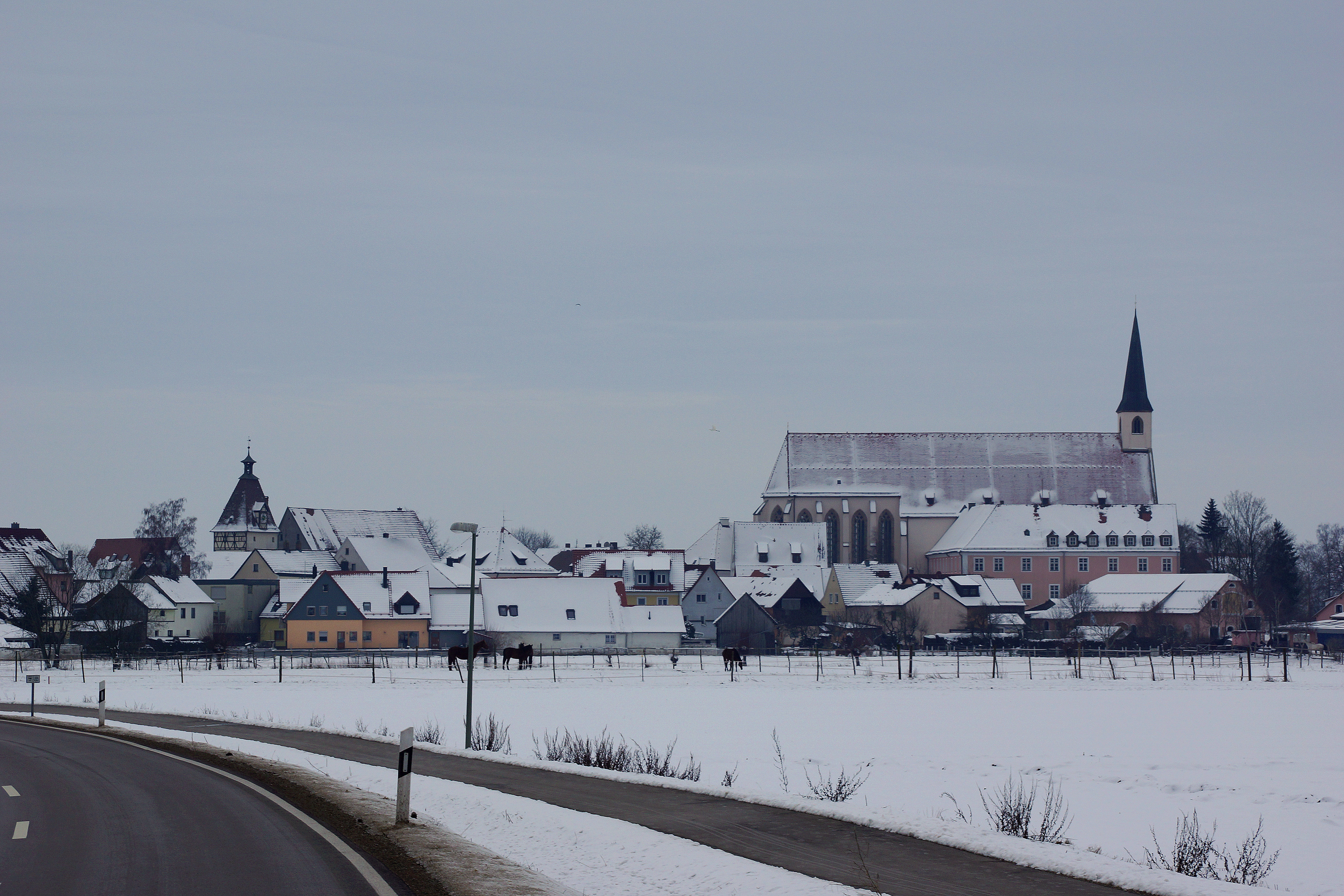 Seligenporten, Ort in der Oberpfälzer Gemeinde Pyrbaum